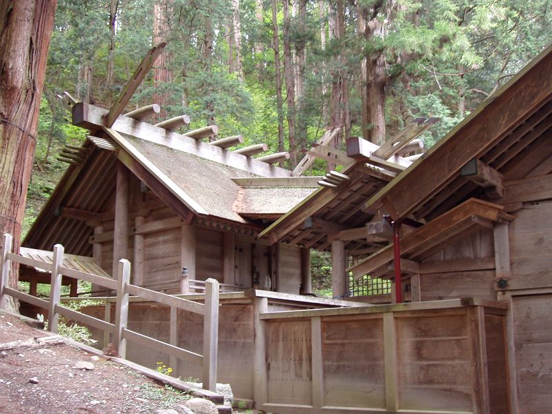 国宝・仁科神明宮本殿（左側面から）